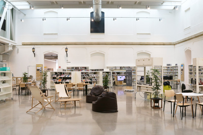 Ubik, Tabakalerako sorkuntza liburutegia